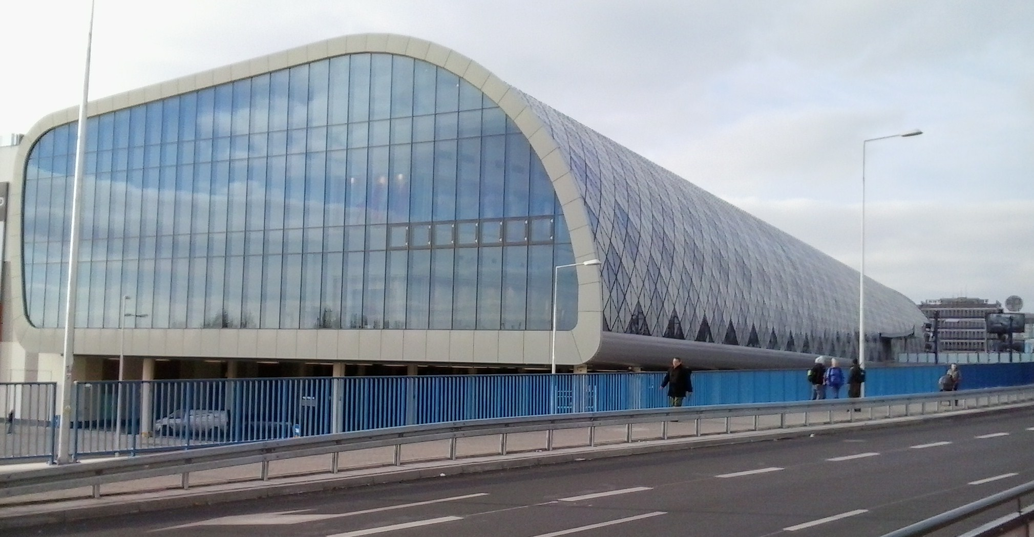 Zintegrowane Centrum Komunikacyjne - Poznań.